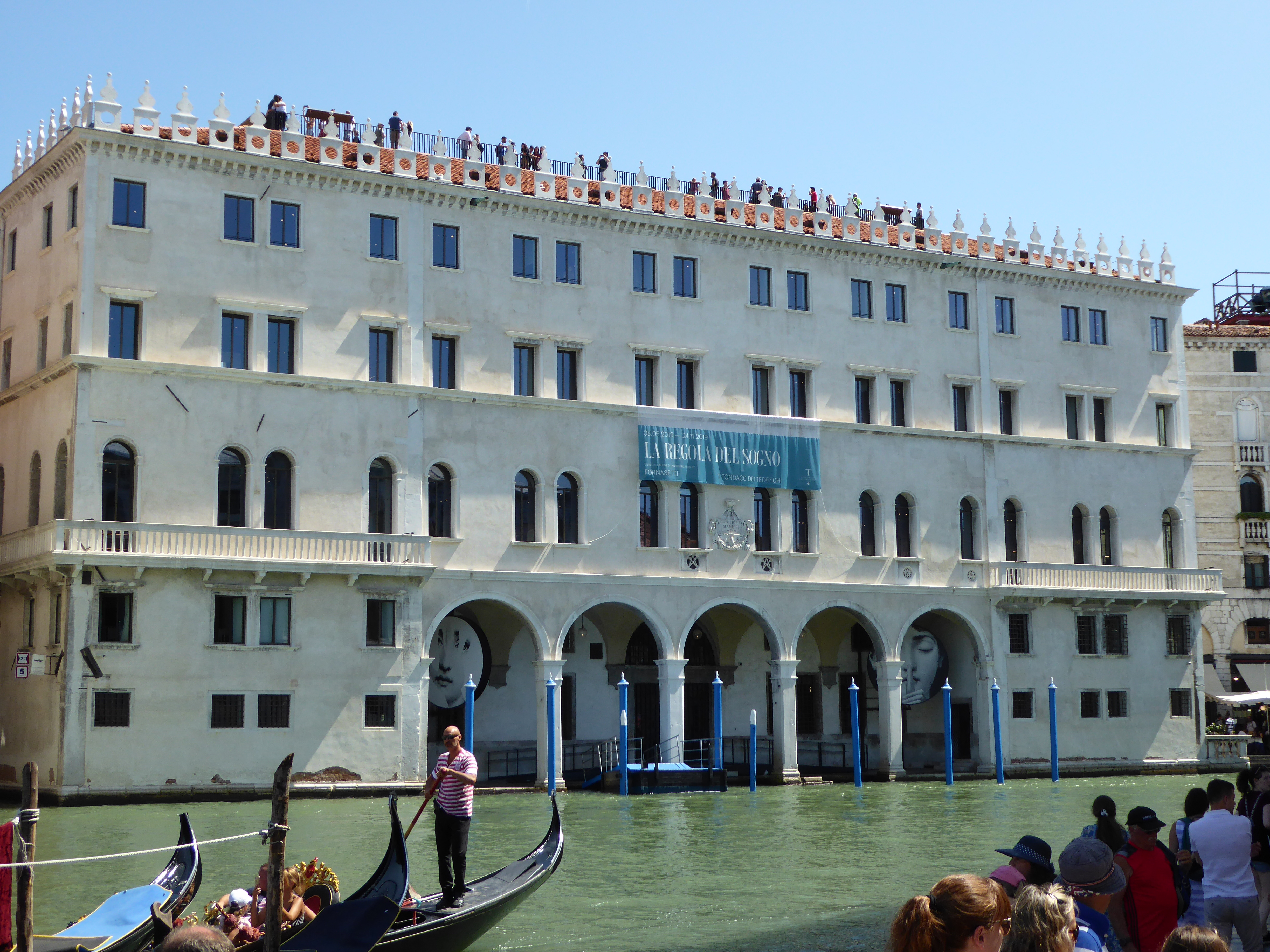 fondaco dei Tedeschi